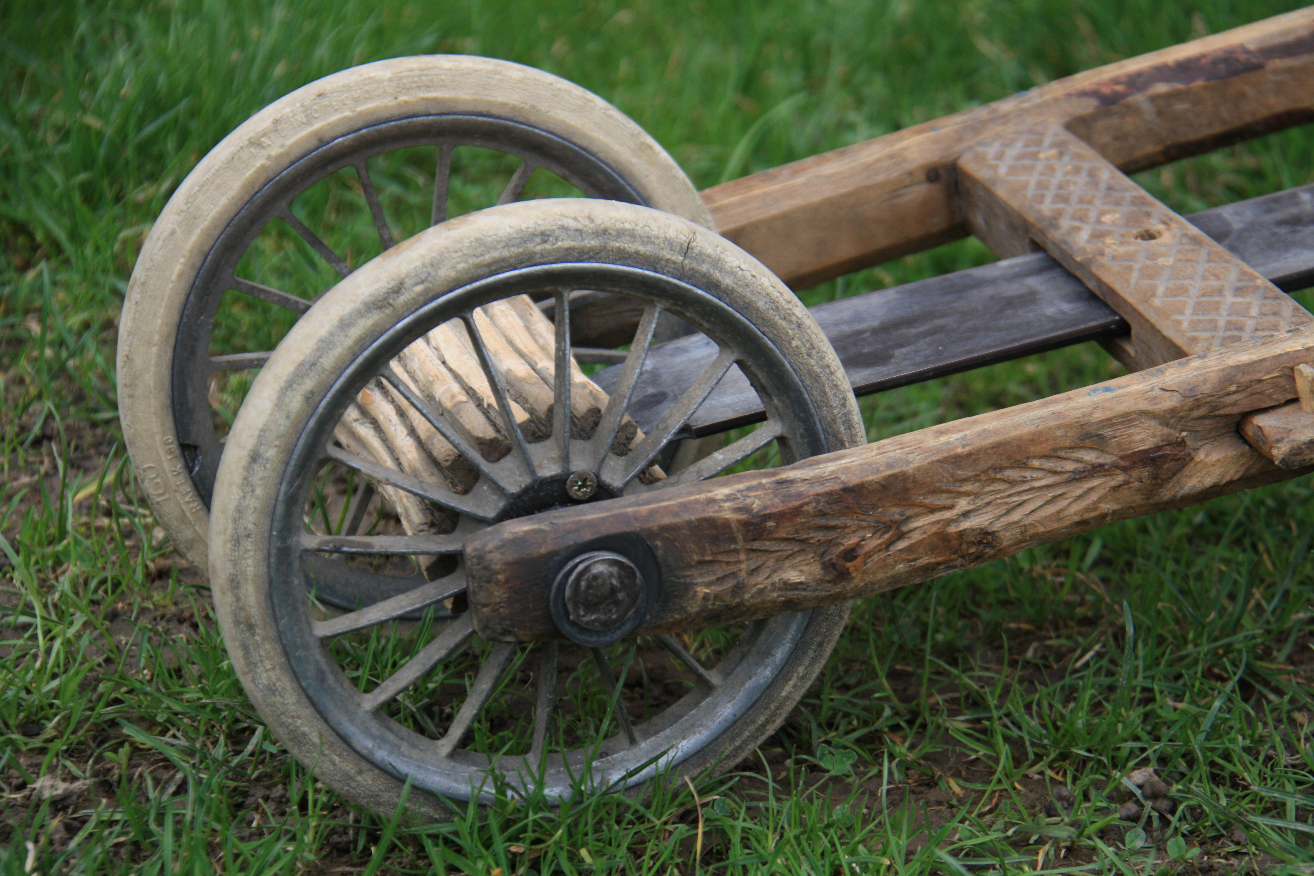 Terkotka taczkowa. Klepotarze (klapotáři) obchodzą domy ze swoimi klapotkami (rapači).